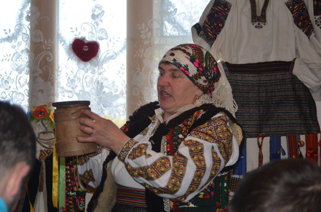 Галинка-Верховинка